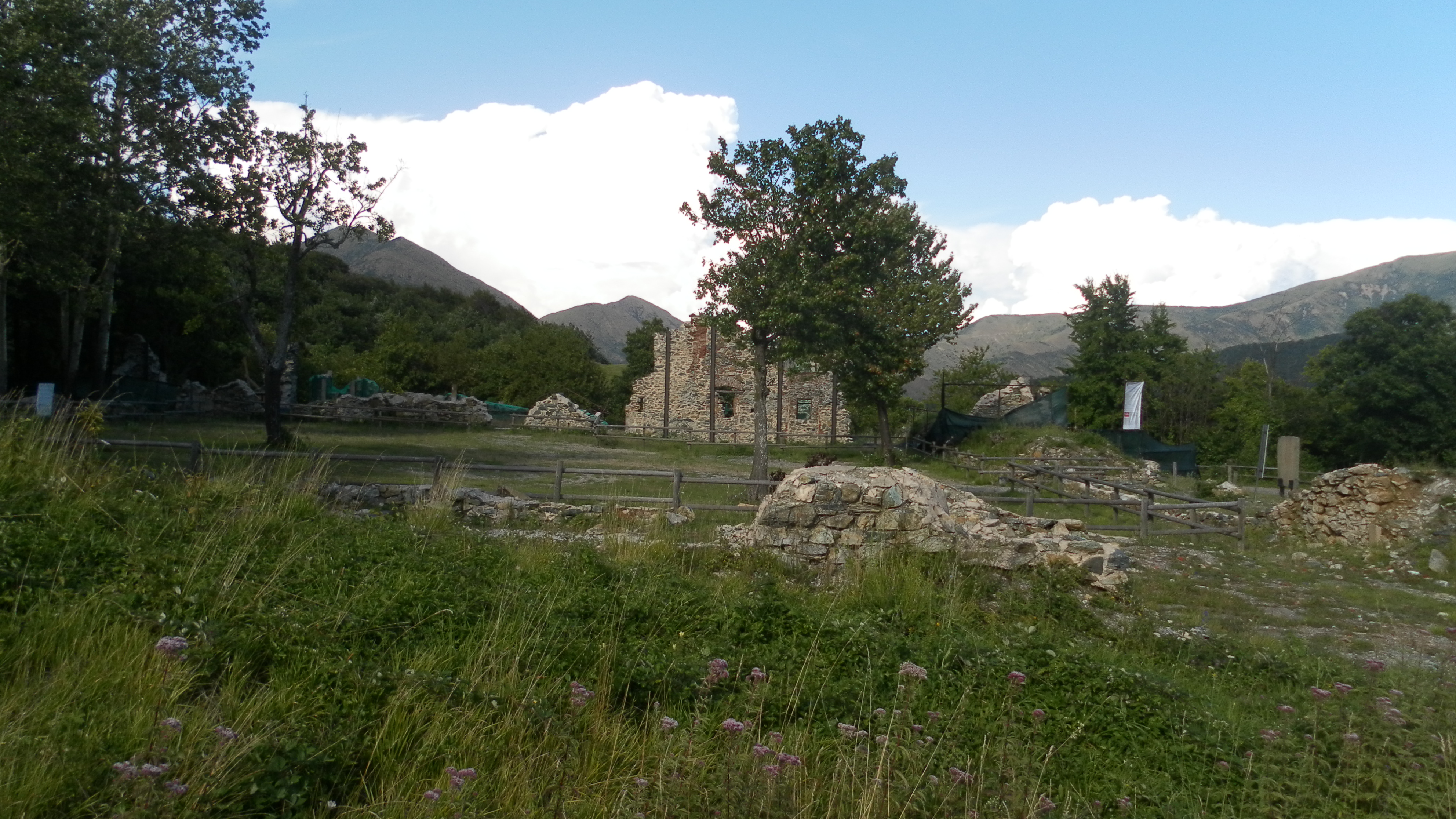 Sacrario presso l'Abbazia della Benedicta, Bosio (AL)